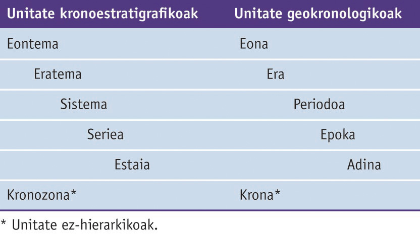 Unitate kronoestratigrafikoak eta geokronologikoak